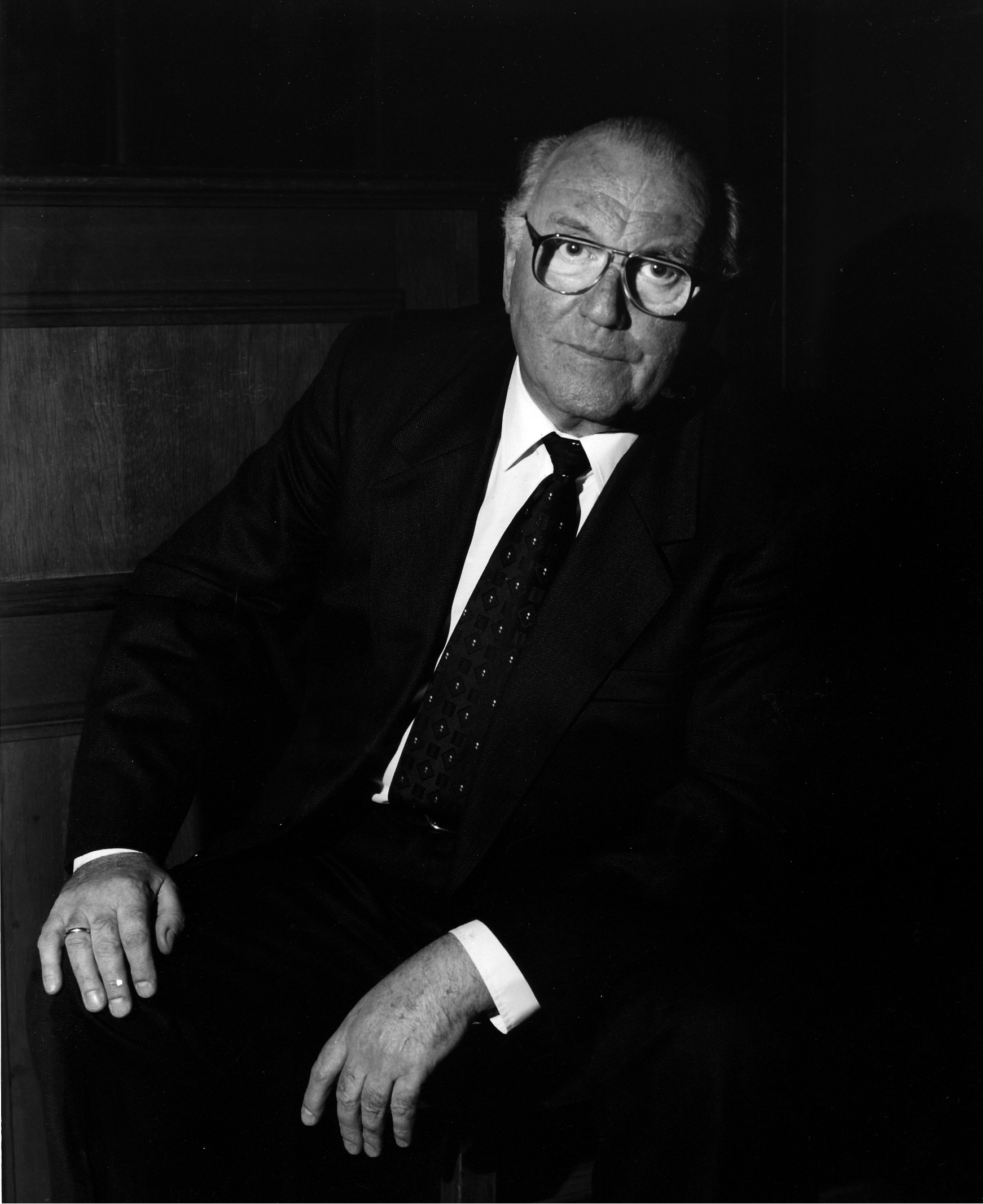 eigen foto componist Frigyes Hidas, compleet rechten vrij